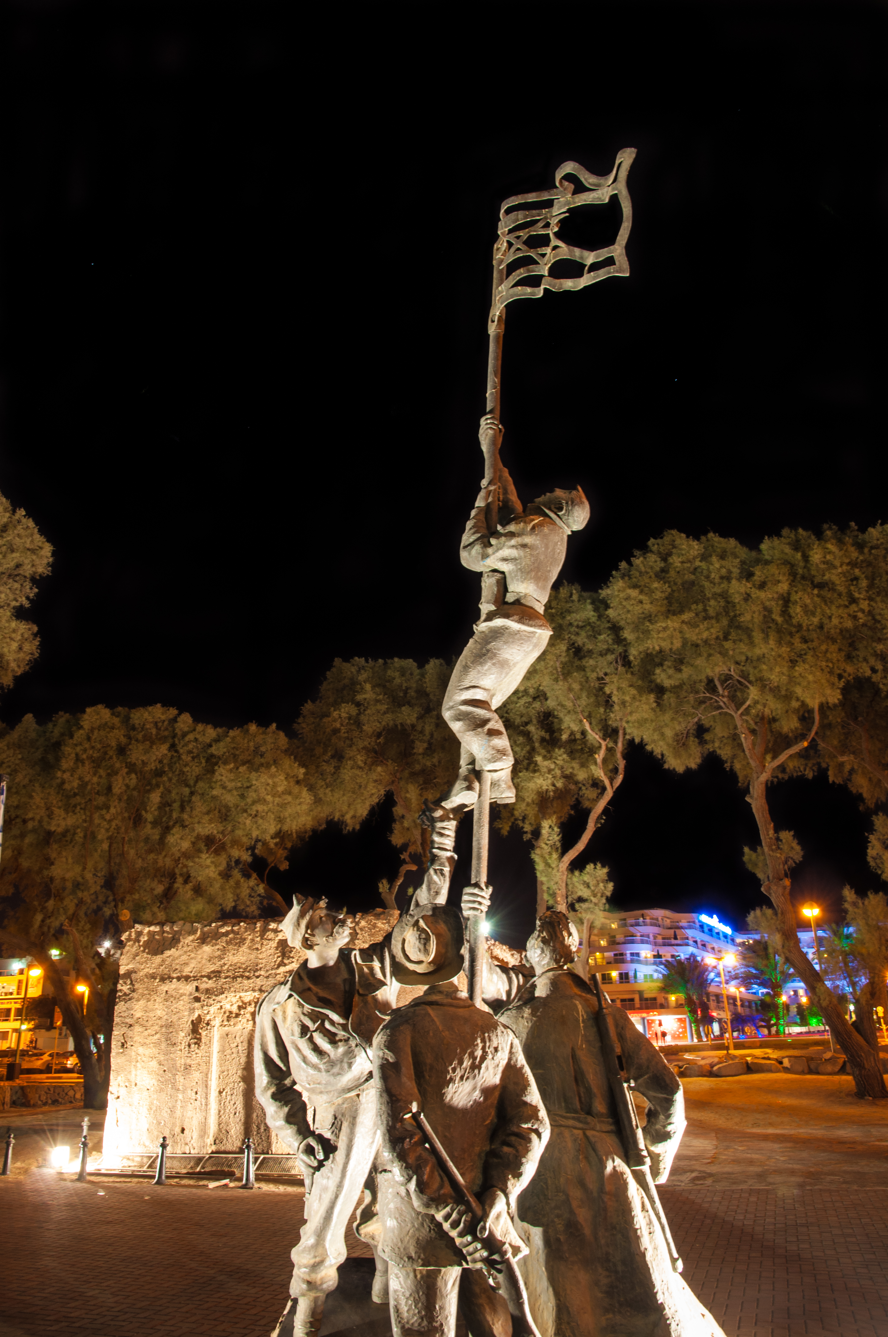 מבנה משטרה בריטי ששכן באום רשרש (אילת) ונכבש על ידי צה"ל במלחמת העצמאות במבצע עובדה. מהמבנים שהיו באתר שרד כיום מבנה אחד, לידו הוצבה אנדרטה המשחזרת את מעמד הנפת "דגל הדיו" במבצע "עובדה".